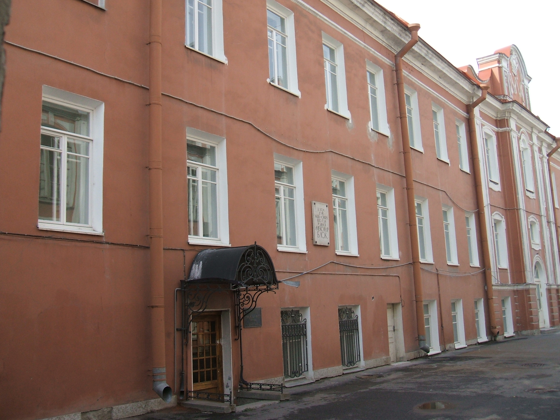 СПб. Университет. Дом где жил поэт Блок А.А.